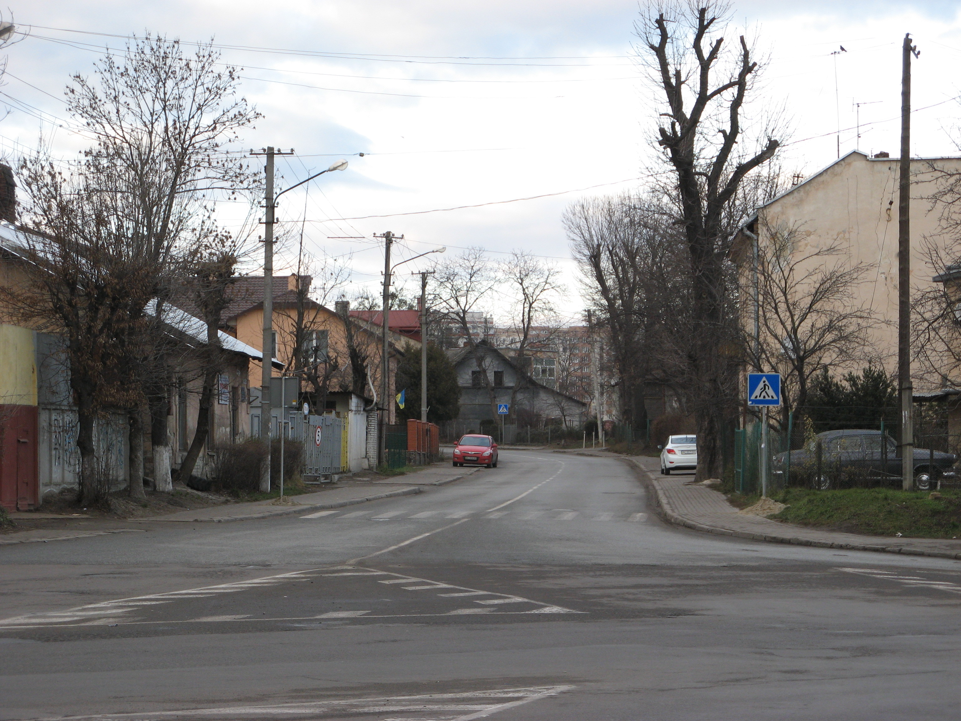 Львів, вул. Варшавська